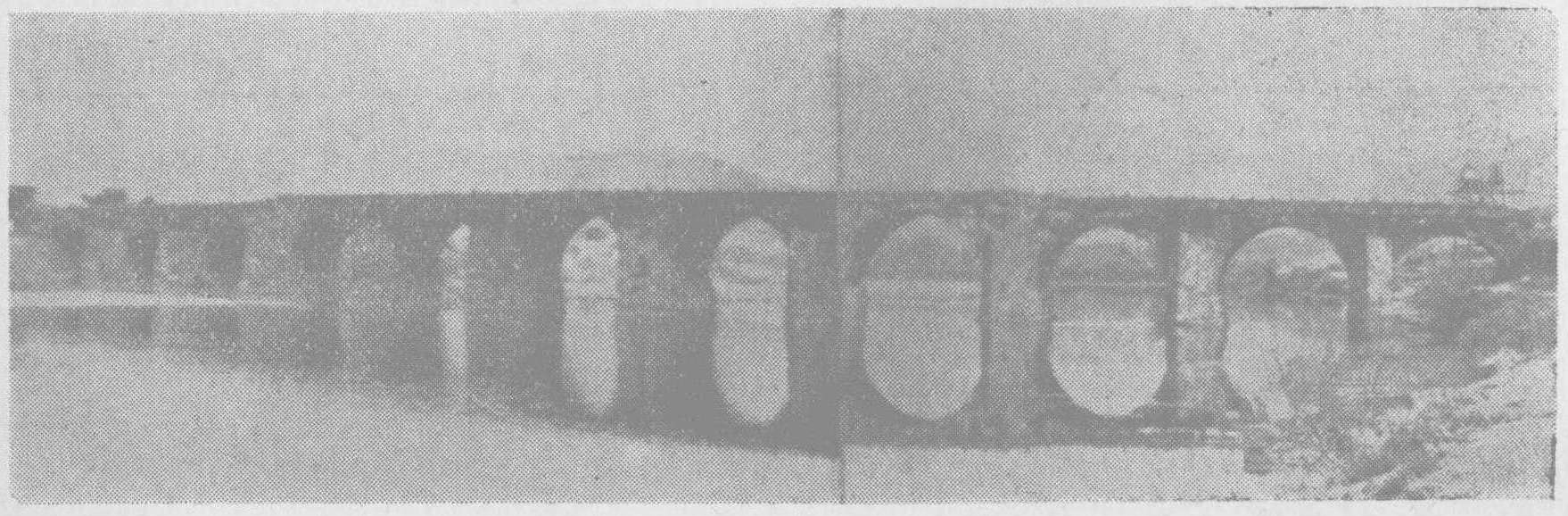 江西新余市分宜县万年桥，1961年。